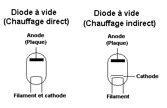 Schémas d'une diode à vide chauffage direct. Dessin personnel. Catégorie:Tube électronique